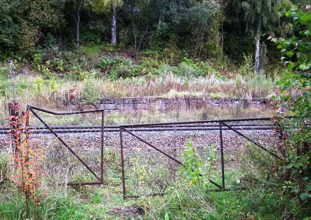 Området der Ringsaker stasjon (opprinnelig Tande stasjon) lå.